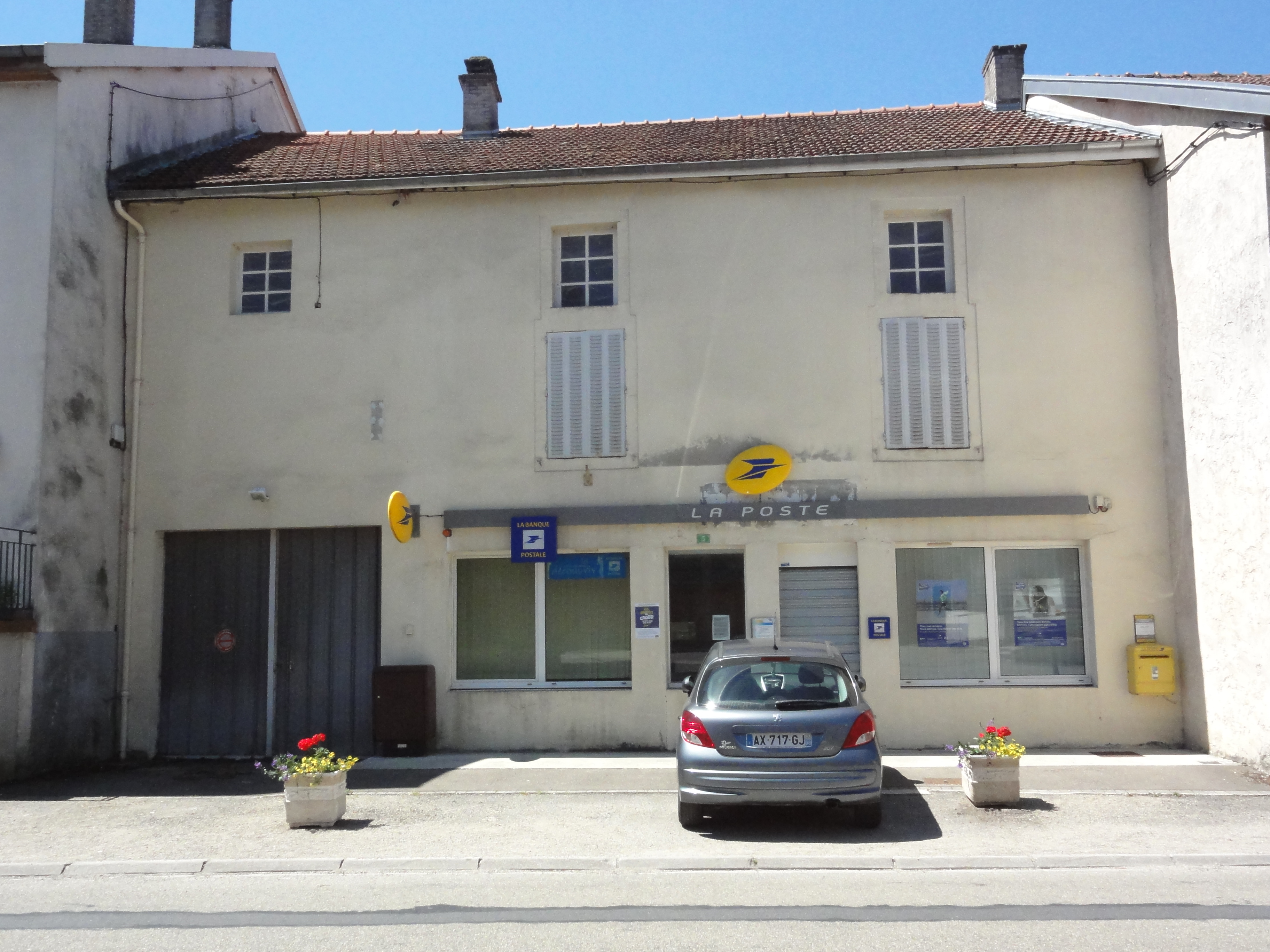 Doulaincourt, la Poste, rue de Pougny